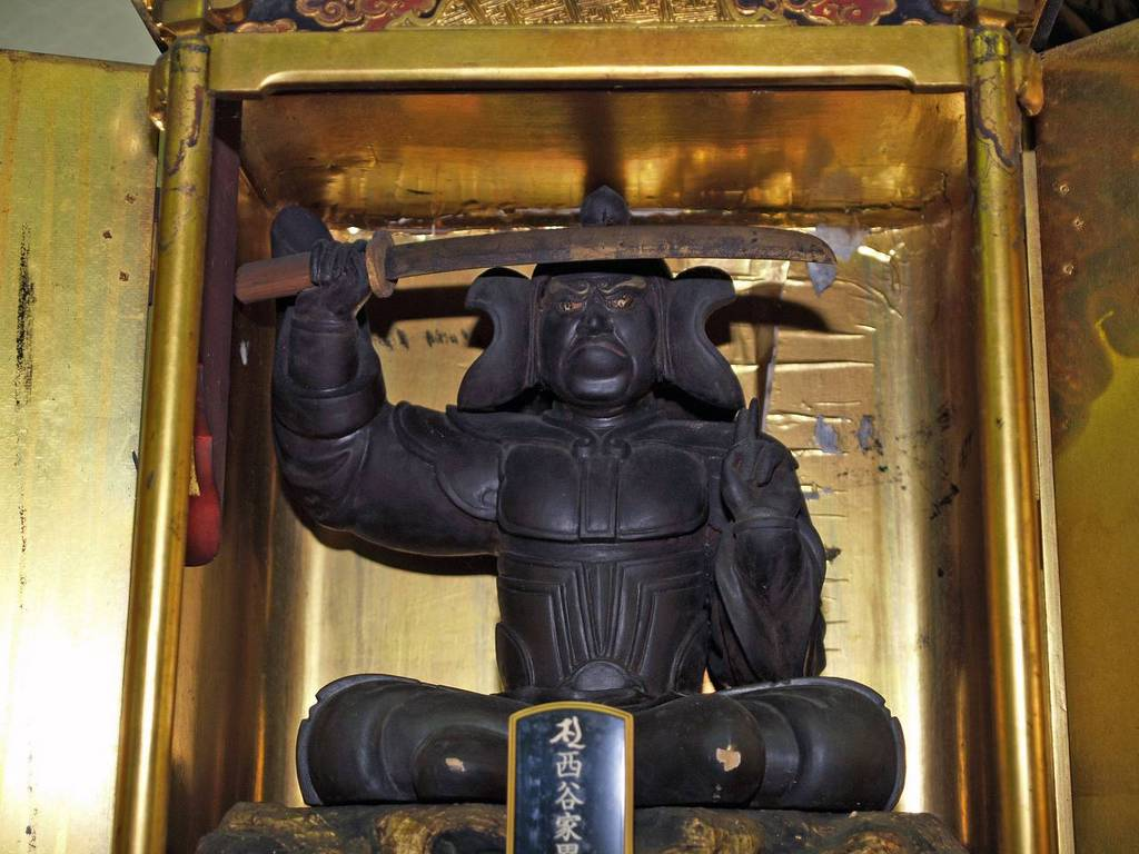 妙見菩薩